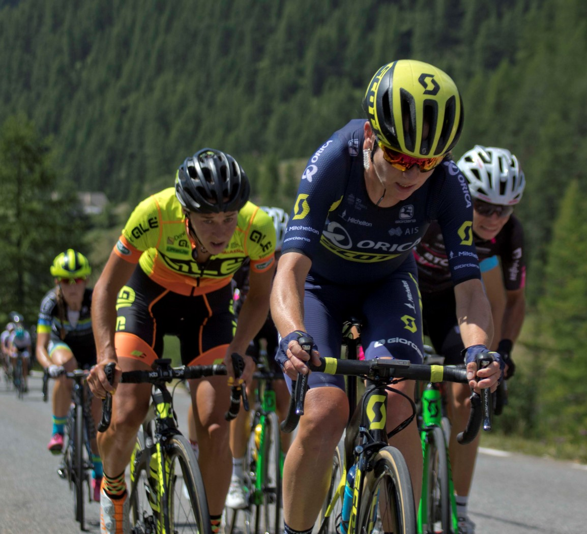 Annemiek van Vleuten op de Col d'Izoard tijdens de eerste etappe van La Course 2017